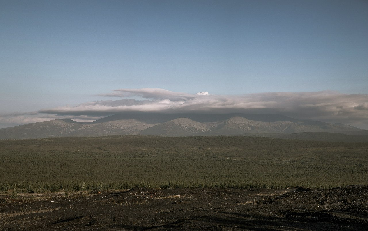 Мать-Гора, Верхоянский район This image is related to the protected area of Russia number 1420068